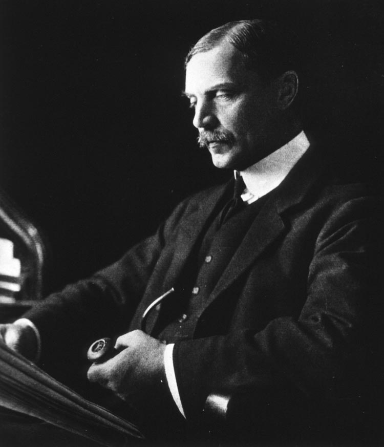 Tomado de: Rubin RP. A Brief History of Great Discoveries in Pharmacology: In Celebration of the Centennial Anniversary of the Founding of the American Society of Pharmacology and Experimental Therapeutics. Pharmacological Reviews. 2007;59(4):289-359.